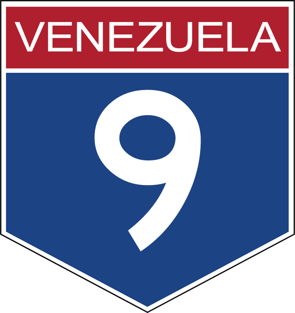 Venezuela: Disco de Identificación Troncal 9